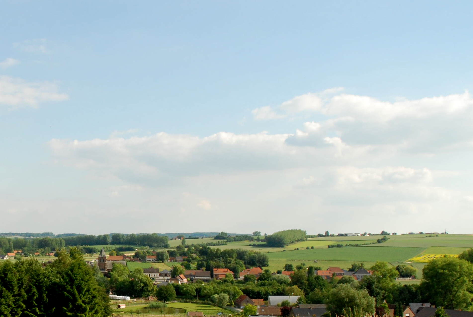 Maarke-Kerkem (België)